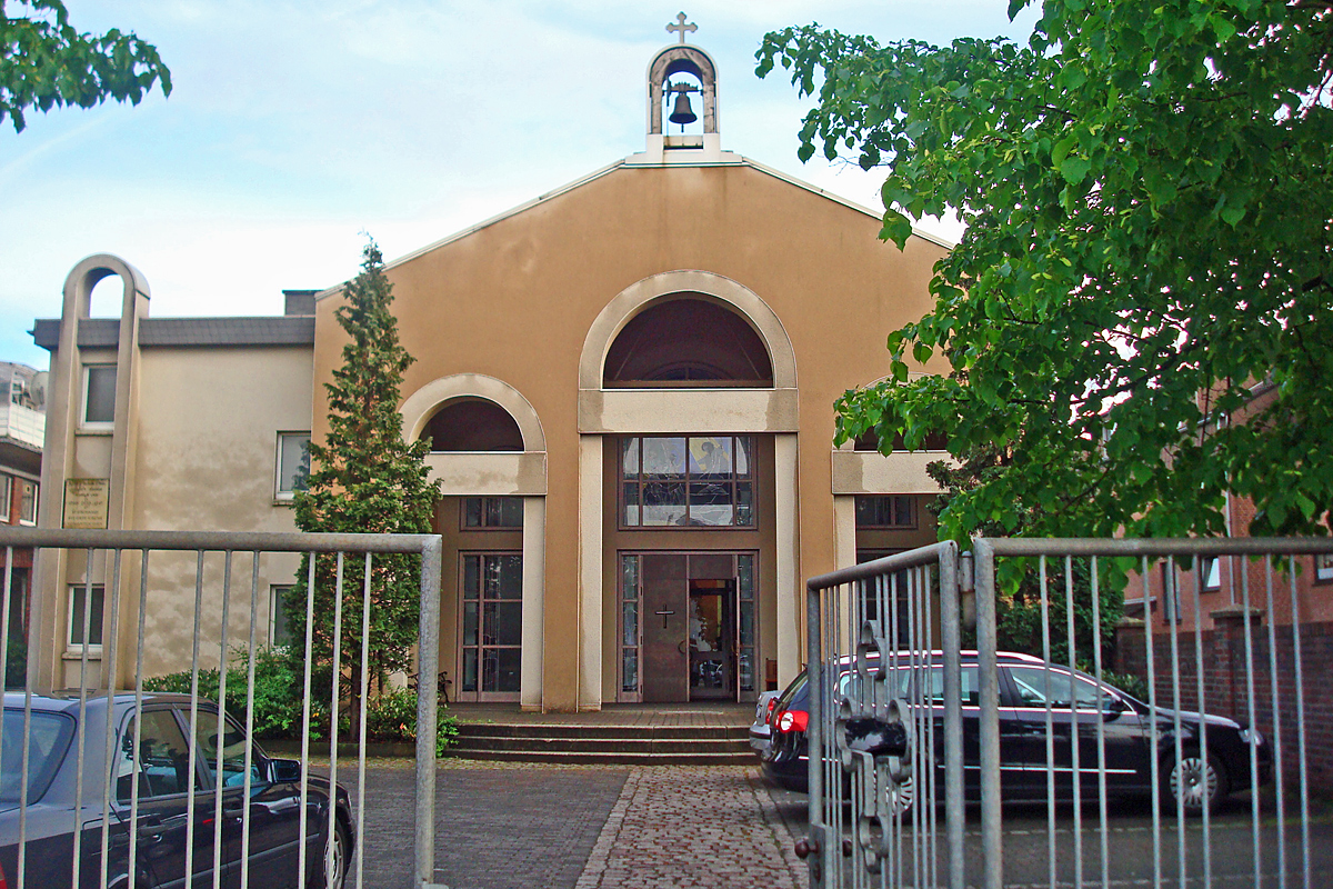 St.-Stephanus-Kirche in Gütersloh, vom Nordring (B61) aus gesehen